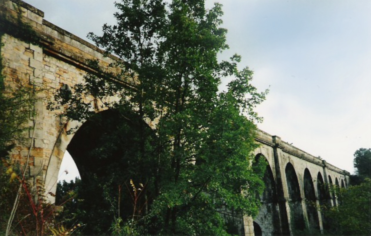 Le Viaduc de Saint-Julien de Cassagnas entre St Julien et Salindres. Photo prise par Vpe en juin 2006. photographie personnelle, si vous voulez utiliser cette image, merci d'en indiquer la source.